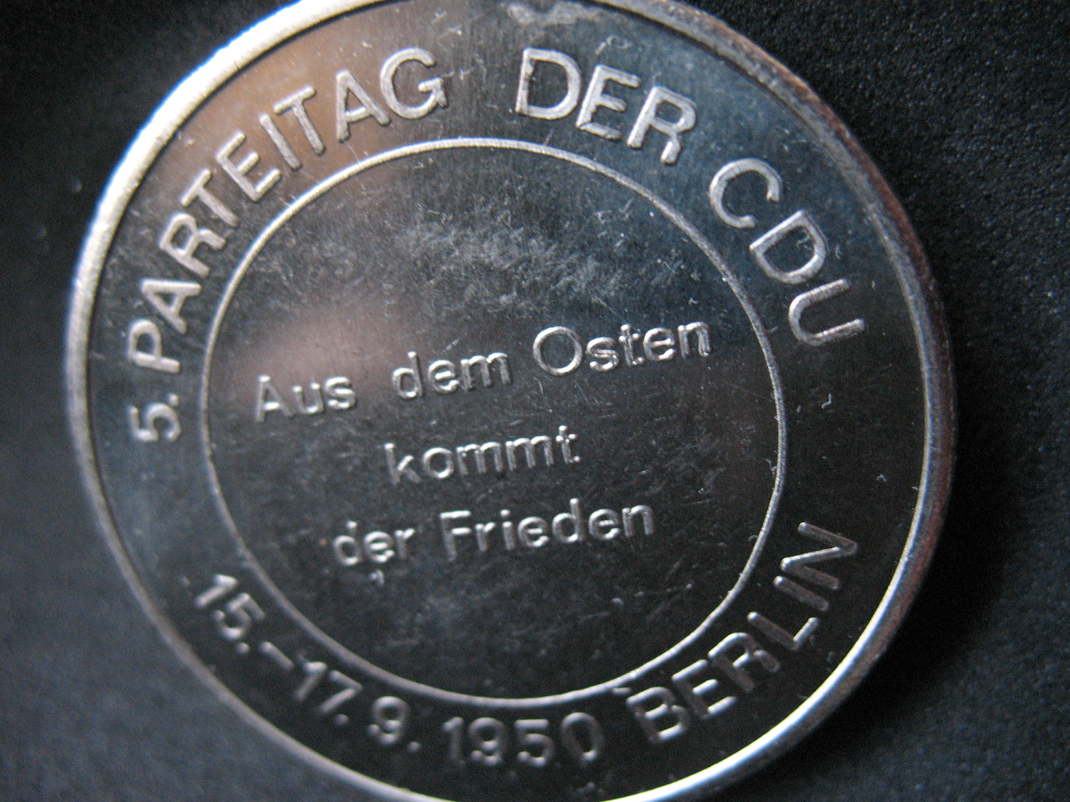 + 00000000001_Image_Gedenkmedaillie zum 5. Parteitag der CDU (DDR) - in Berlin - vom 15. - 17. 9.1950